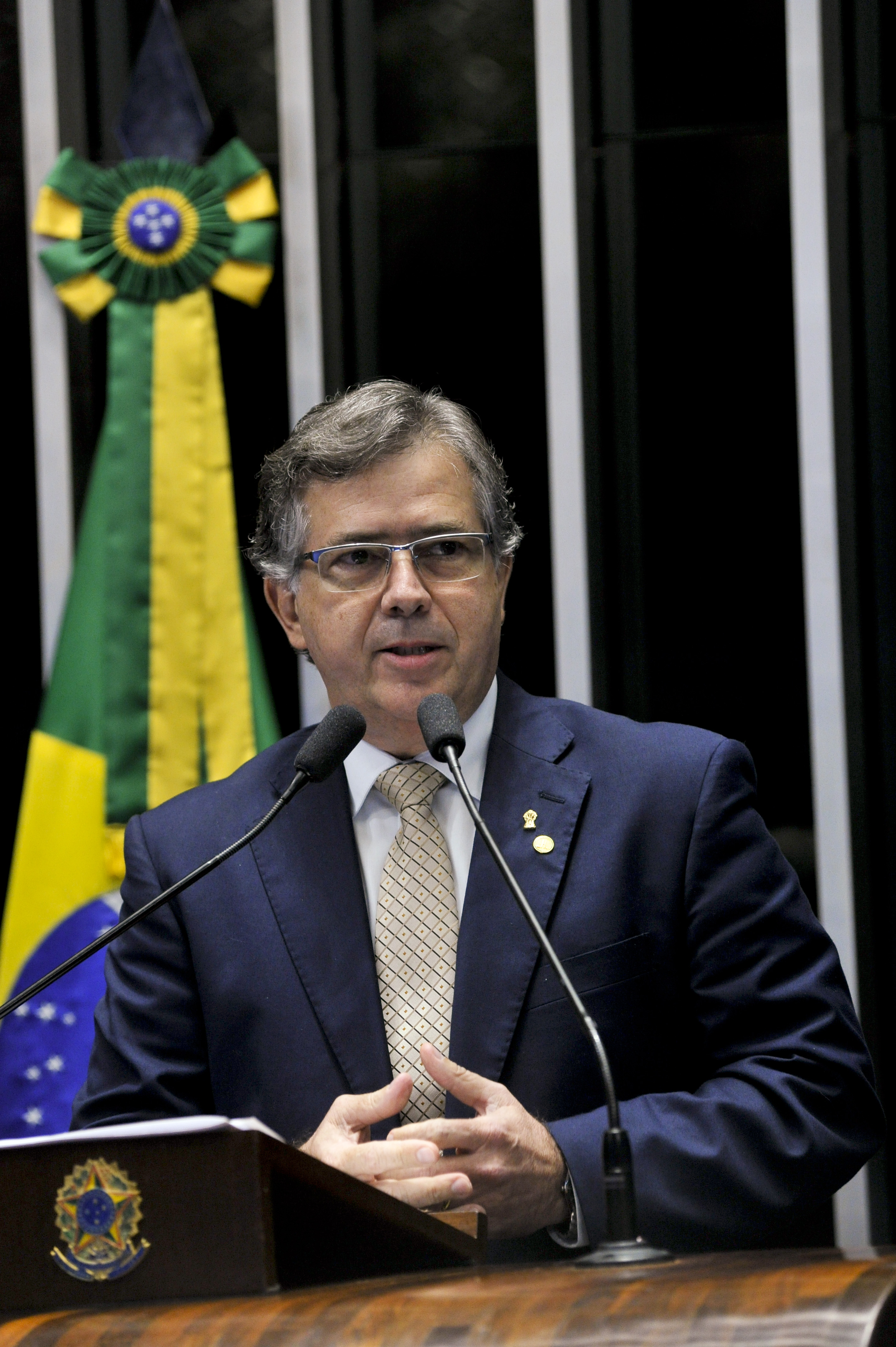 Plenário do Senado Federal durante sessão solene do Congresso Nacional destinada a homenagear a memória do ex-senador Jarbas Passarinho. Em discurso, o sobrinho-neto do homenageado, deputado Joaquim Passarinho (PSD-PA). Foto: Geraldo Magela/Agência Senado